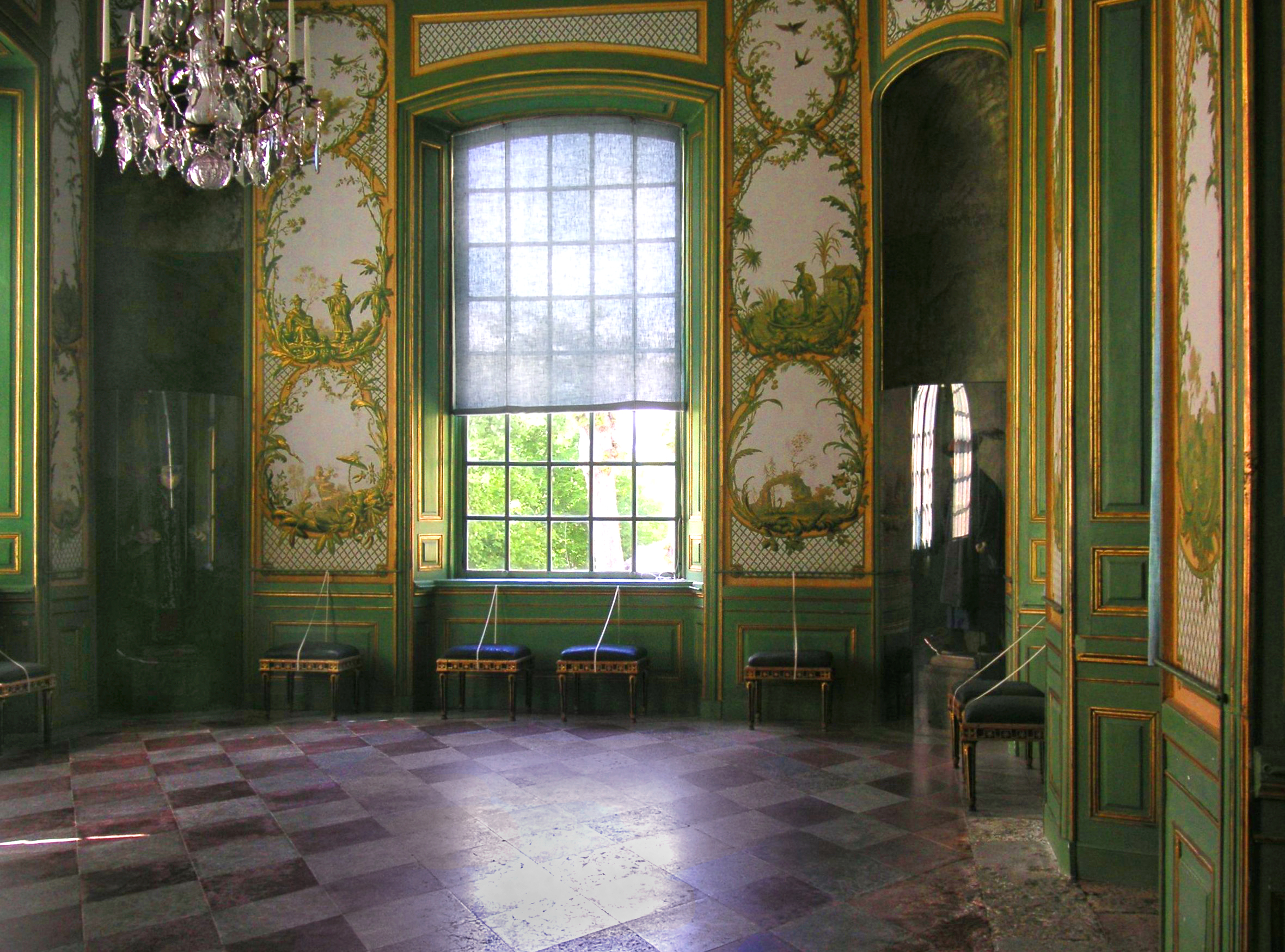 Interiör Kina slott på Drottningholm